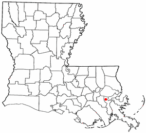 Louisiana map; dot on Waggaman